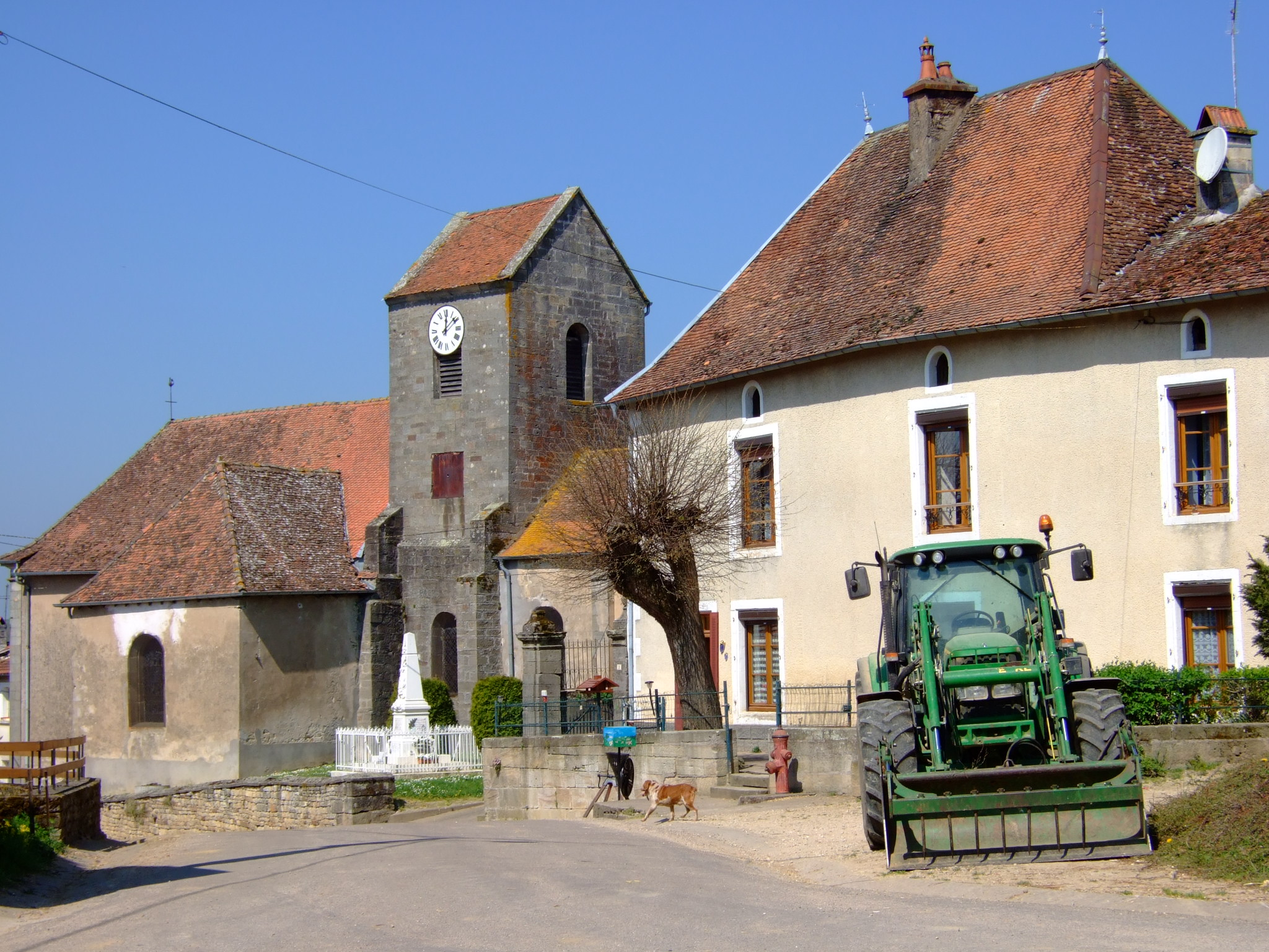 Bousseraucourt